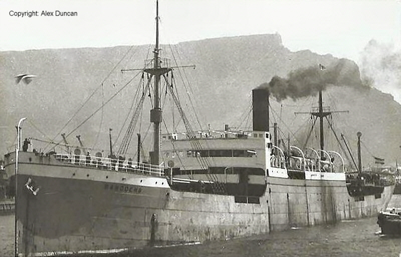 Die ehemalige Uhenfels als niederländische Bandoeng